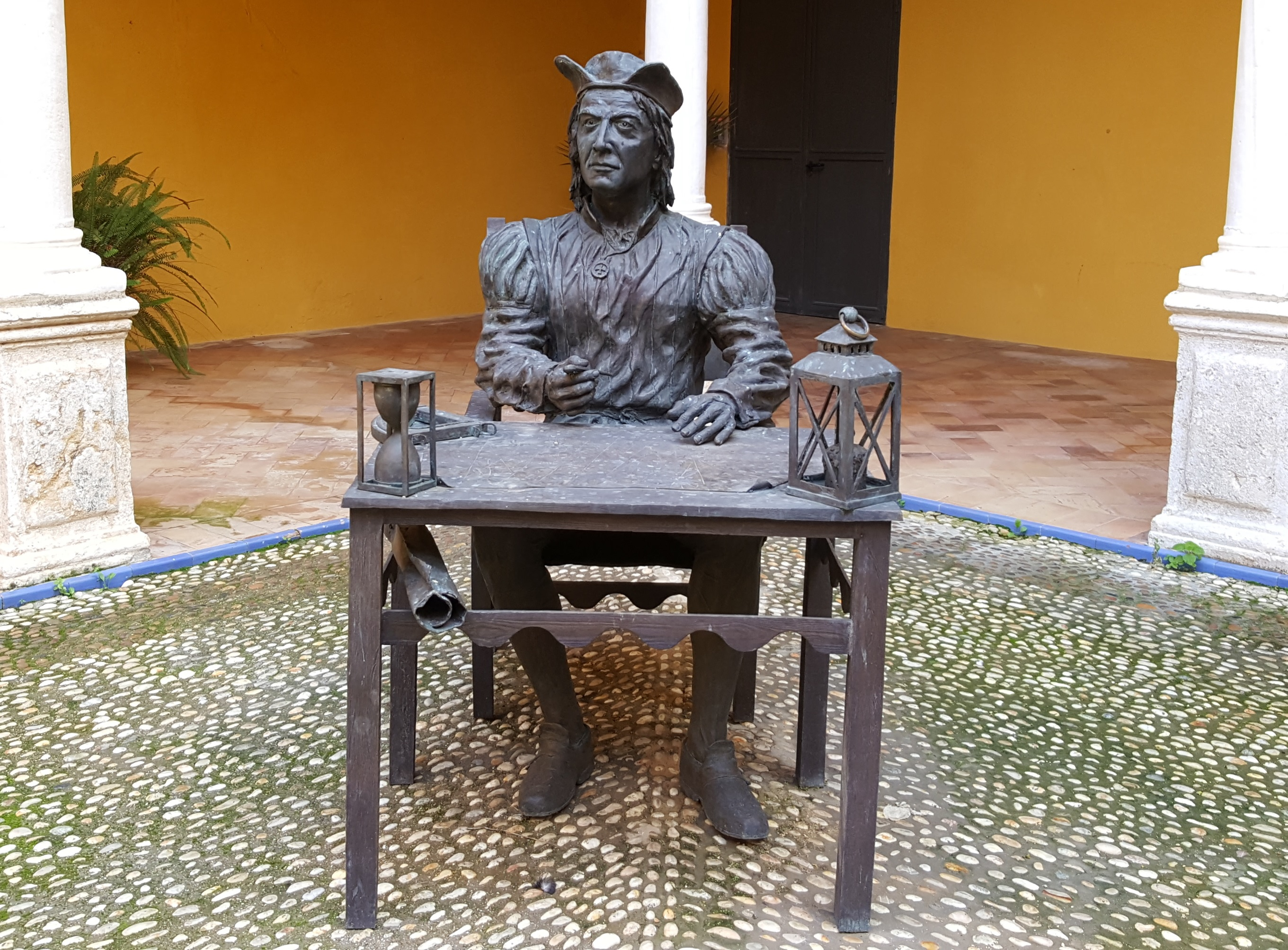 Estatua de Pedro Alonso Niño, obra del escultor asturiano Anselmo Iglesias Poli. En la actualidad se encuentra ubicada en el Convento de San Francisco de Moguer. Primera pieza del futuro monumento, que incluye a sus hermanos y la Nao Santa María.